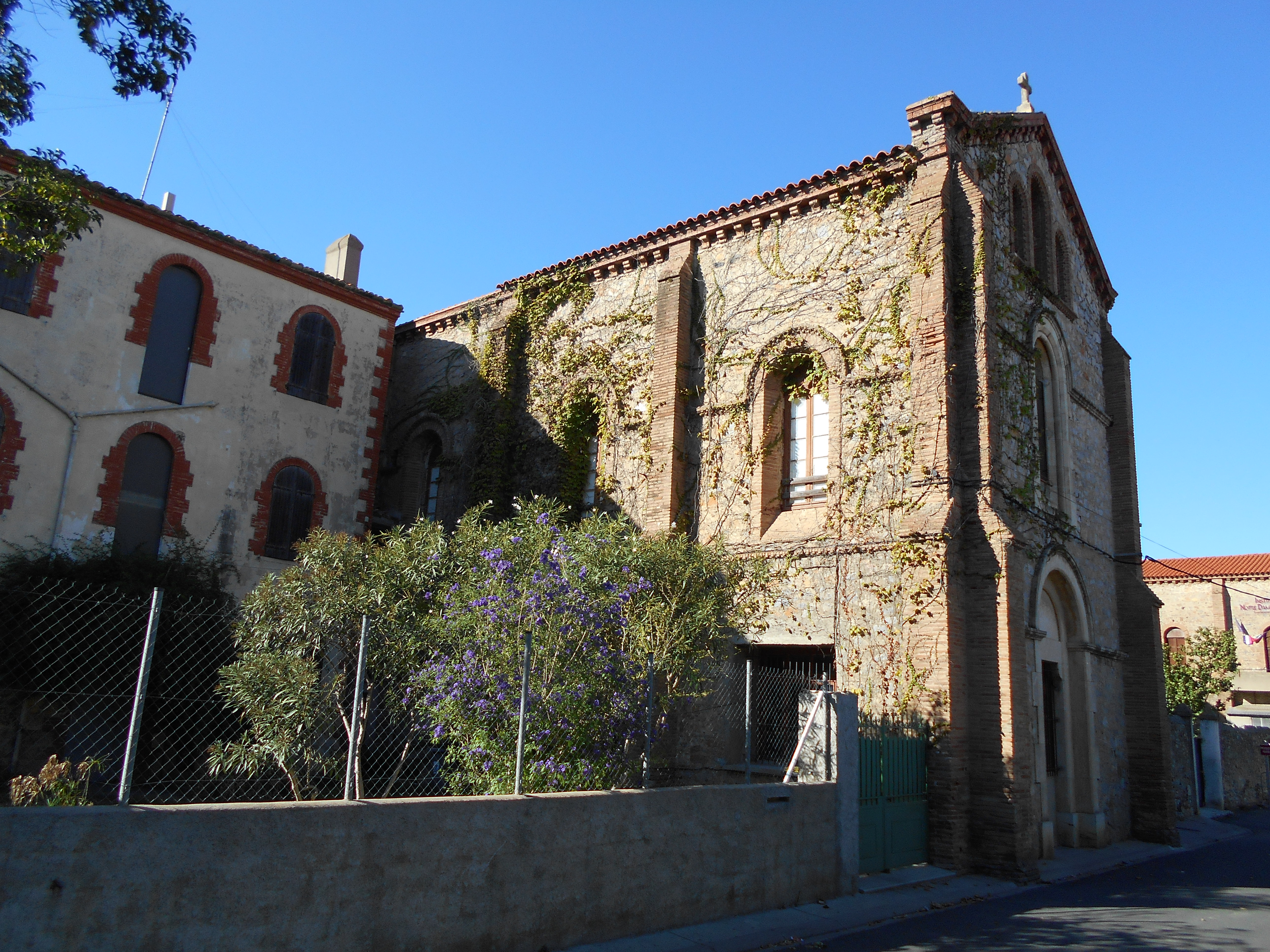 Església de Nostra Senyora dels Àngels d'Espirà de l'Aglí